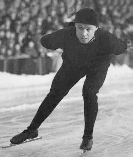 Charles Mathiesen running 1500 m im Garmisch